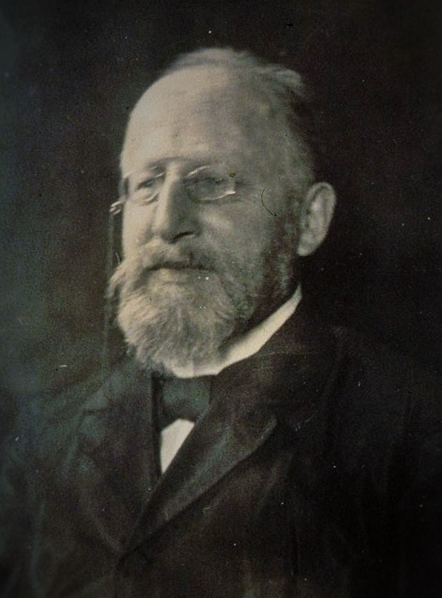 Titre : Rodolphe Reuss, ancien bibliothécaire de la ville de Strasbourg, Buste, face Date d'édition : 1905 Sujet : Strasbourg Sujet : PORTRAIT, Reuss (Rodolphe) Type : image fixe Langue : zxx Format : 17,9 x 12,8 cm Format : image/jpeg Droits : domaine public Identifiant : ark:/12148/btv1b10208763f Source : Bibliothèque nationale et universitaire de Strasbourg, NIM17059 Relation : Description : Appartient à l’ensemble documentaire : BNUStr003 Provenance : bnf.fr Date de mise en ligne : 23/09/2013